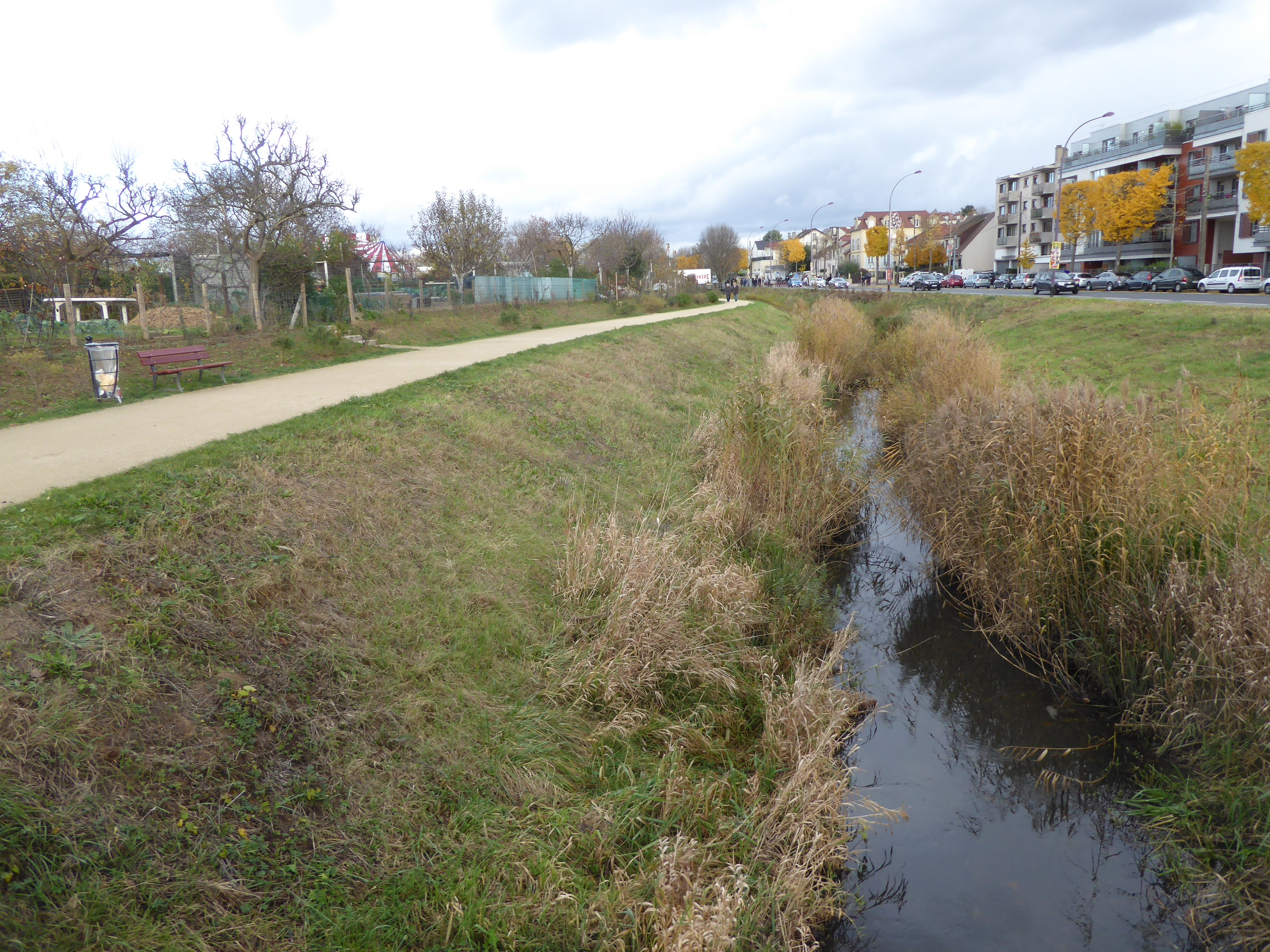 L'Haÿ-les-Roses Bièvre av. Flouquet sud 3